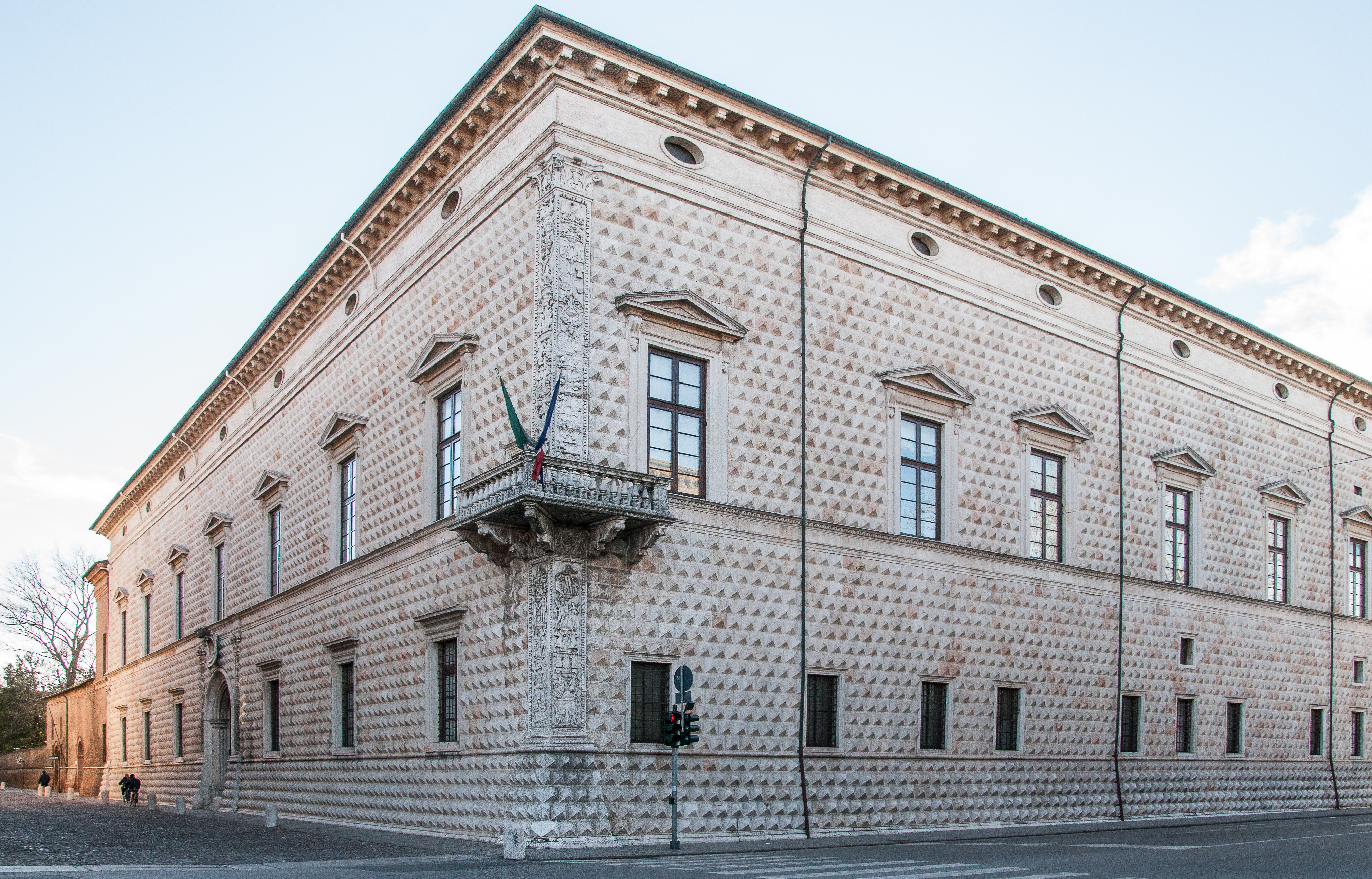 Palazzo dei Diamanti This is a photo of a monument which is part of cultural heritage of Italy.